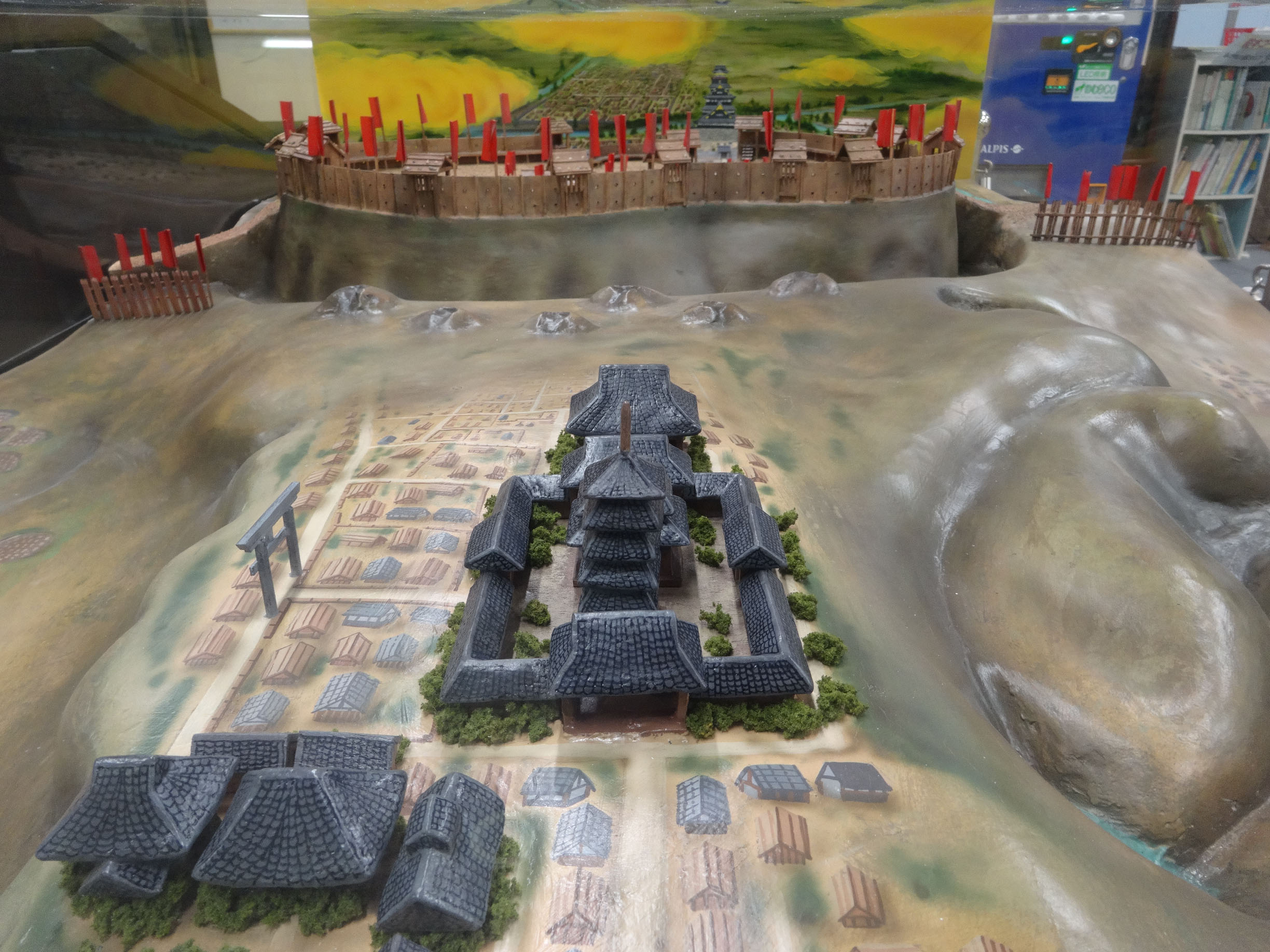 真田丸復元ジオラマ 大阪府・天王寺区役所 監修・千田嘉博（奈良大学学長）